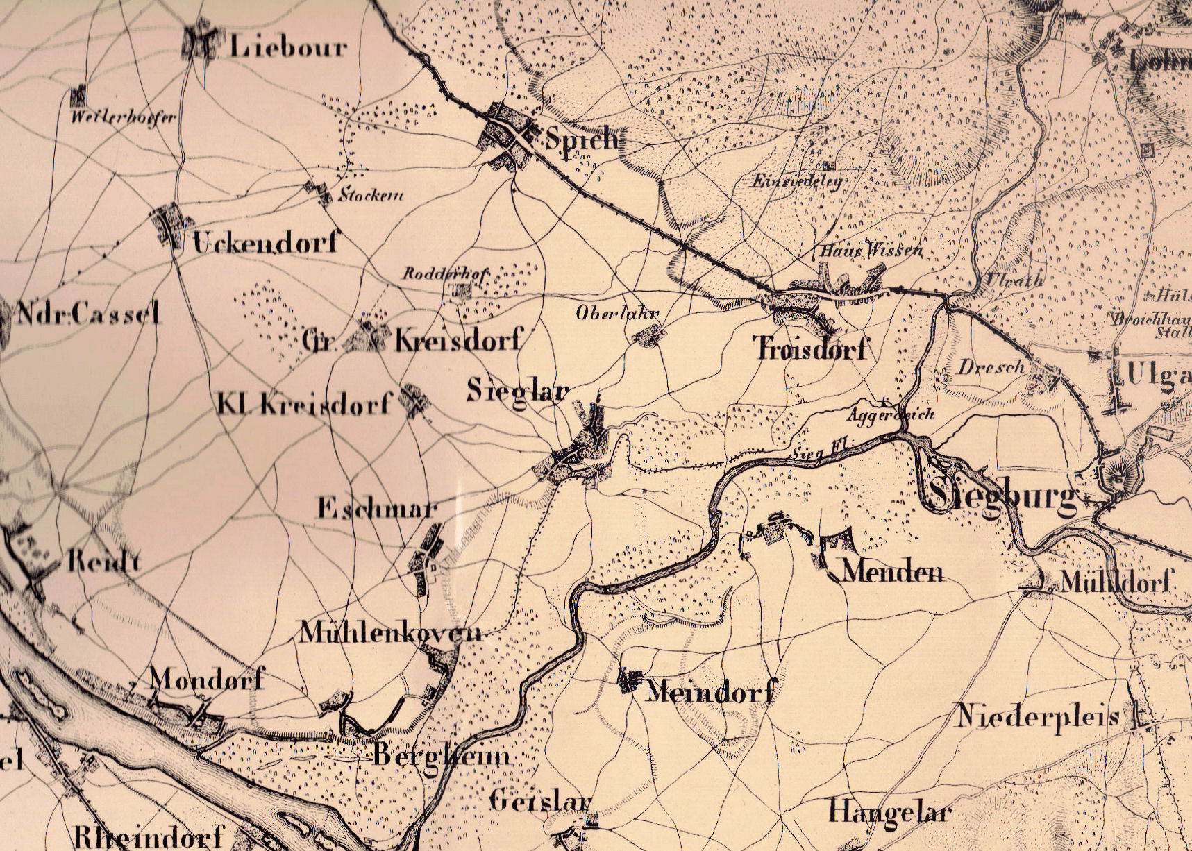 Troisdorf